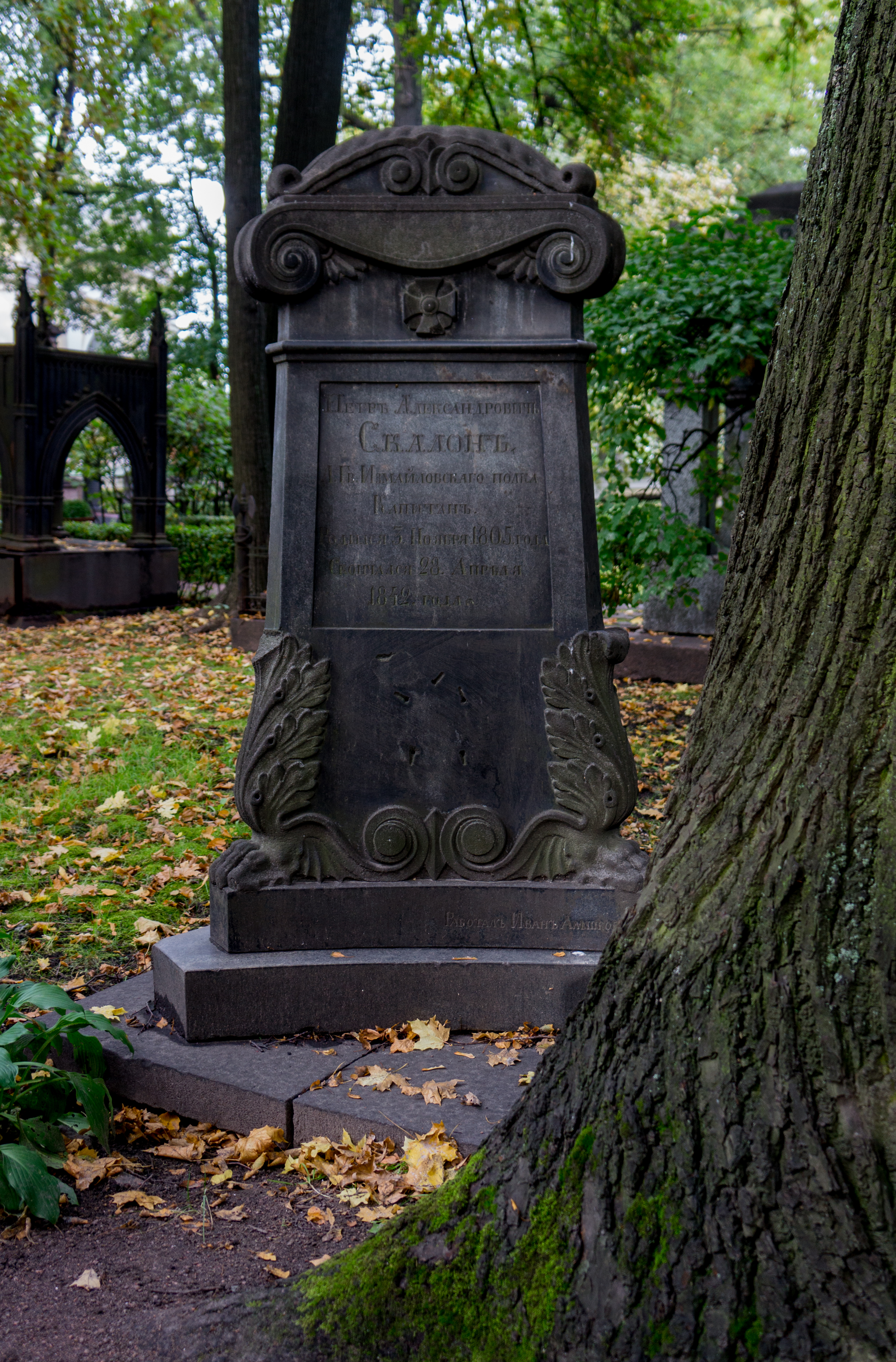 Могила и надгробие Скалона П.А. (1805-1842): Александра Невского площадь, 1. Некрополь мастеров искусств, центральная аллея, Центральный район, Санкт-Петербург